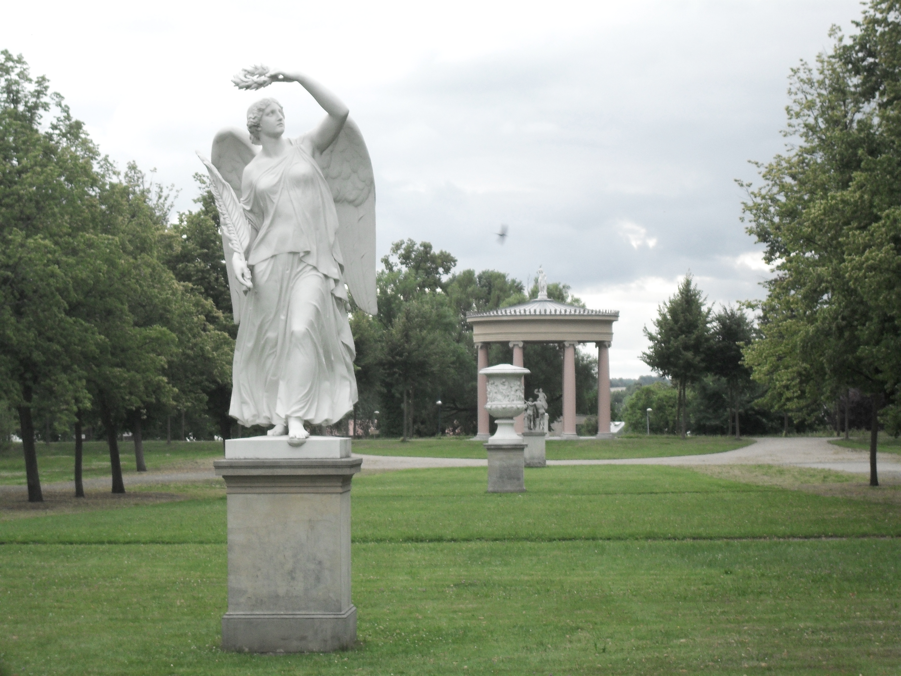 Sicht auf die barocke Mittelachse des Neustrelitzer Schlossparks